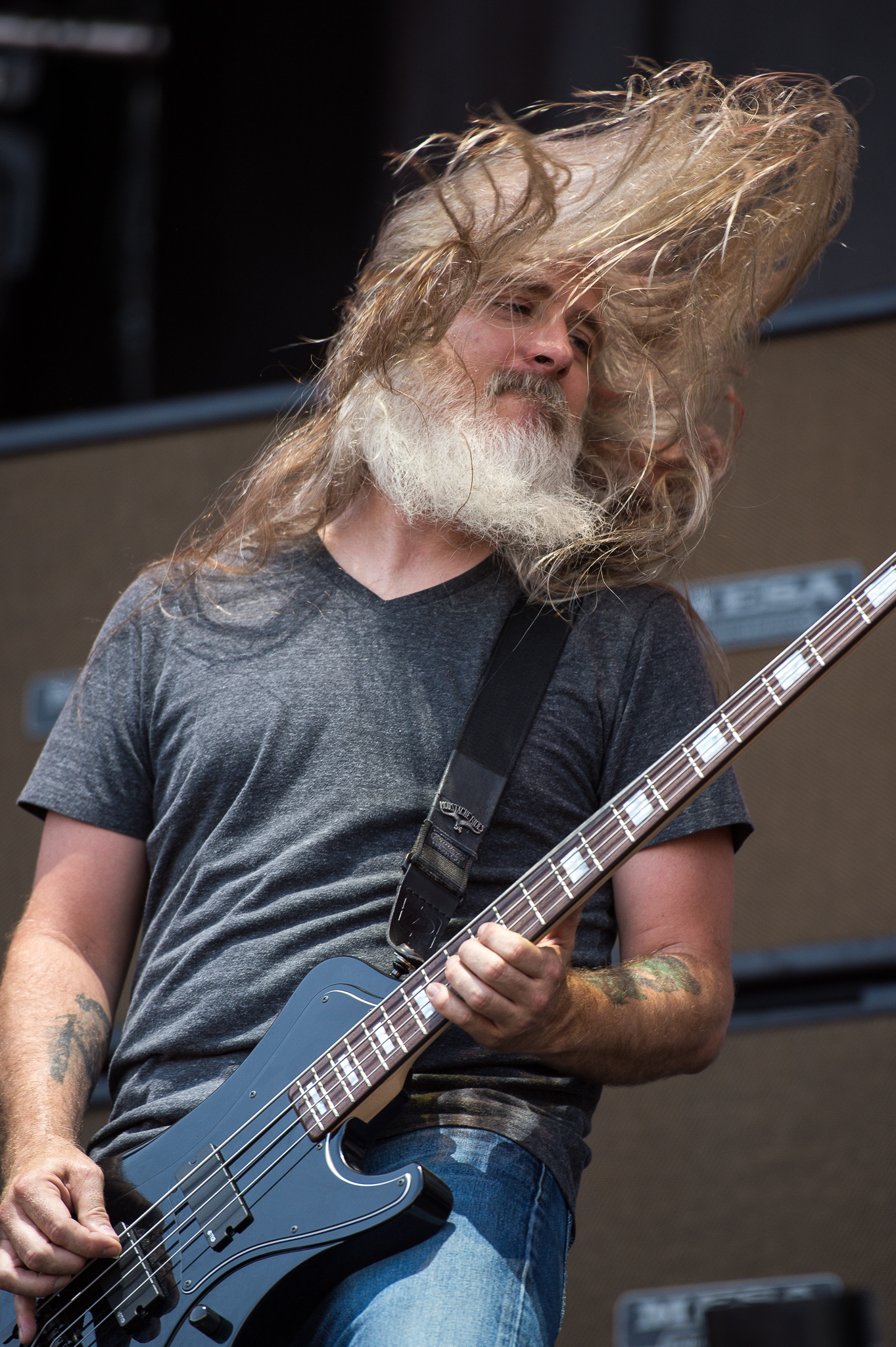 ARGO-Konzerte,Beck's Park Stage,Festival,John Campbell,Konzert,Lamb of God,Livekonzert,Livemusik,Musik,RiP,Rock im Park 2015